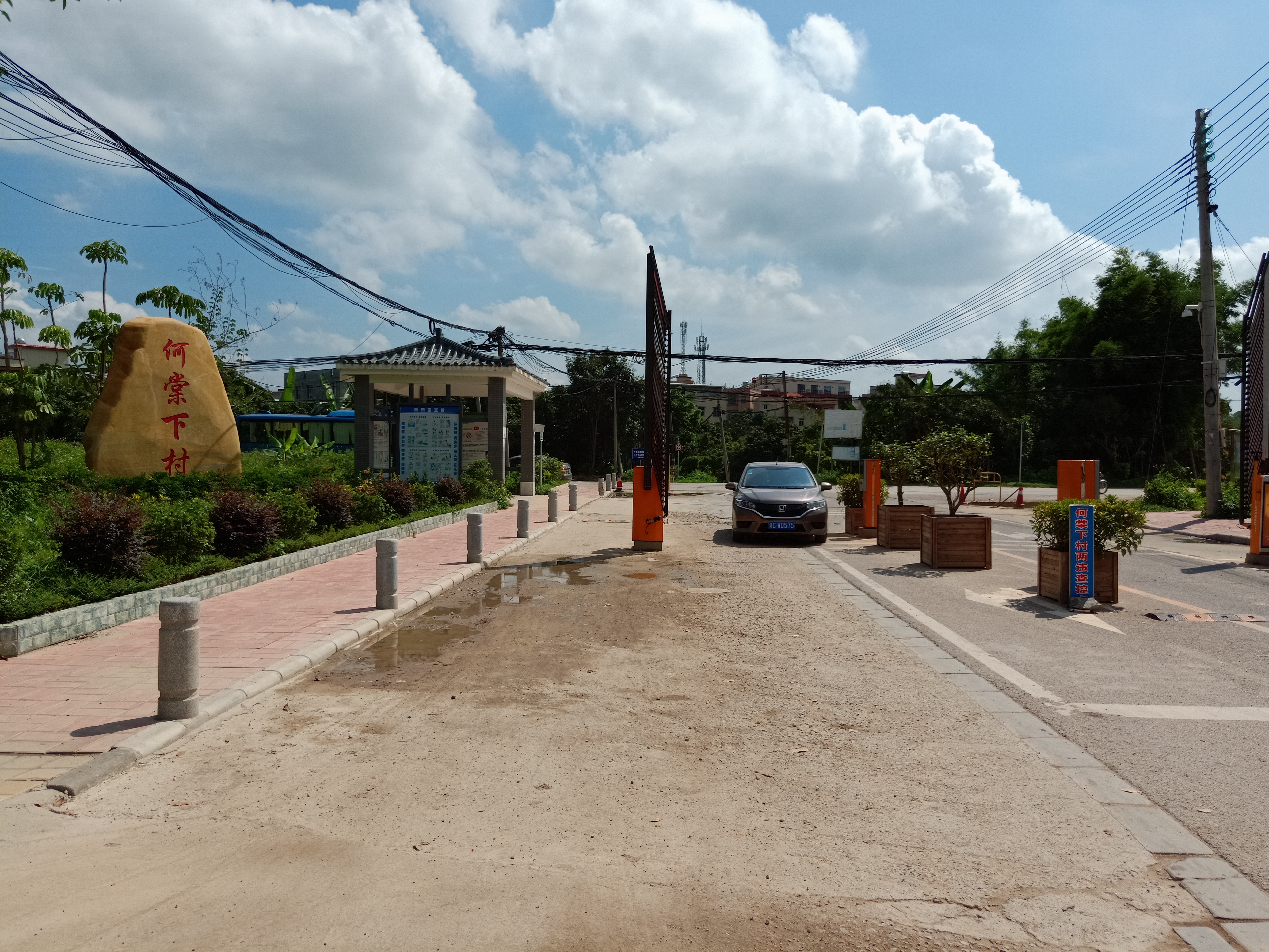 粵語: 廣州市黃埔區荷棠下村口